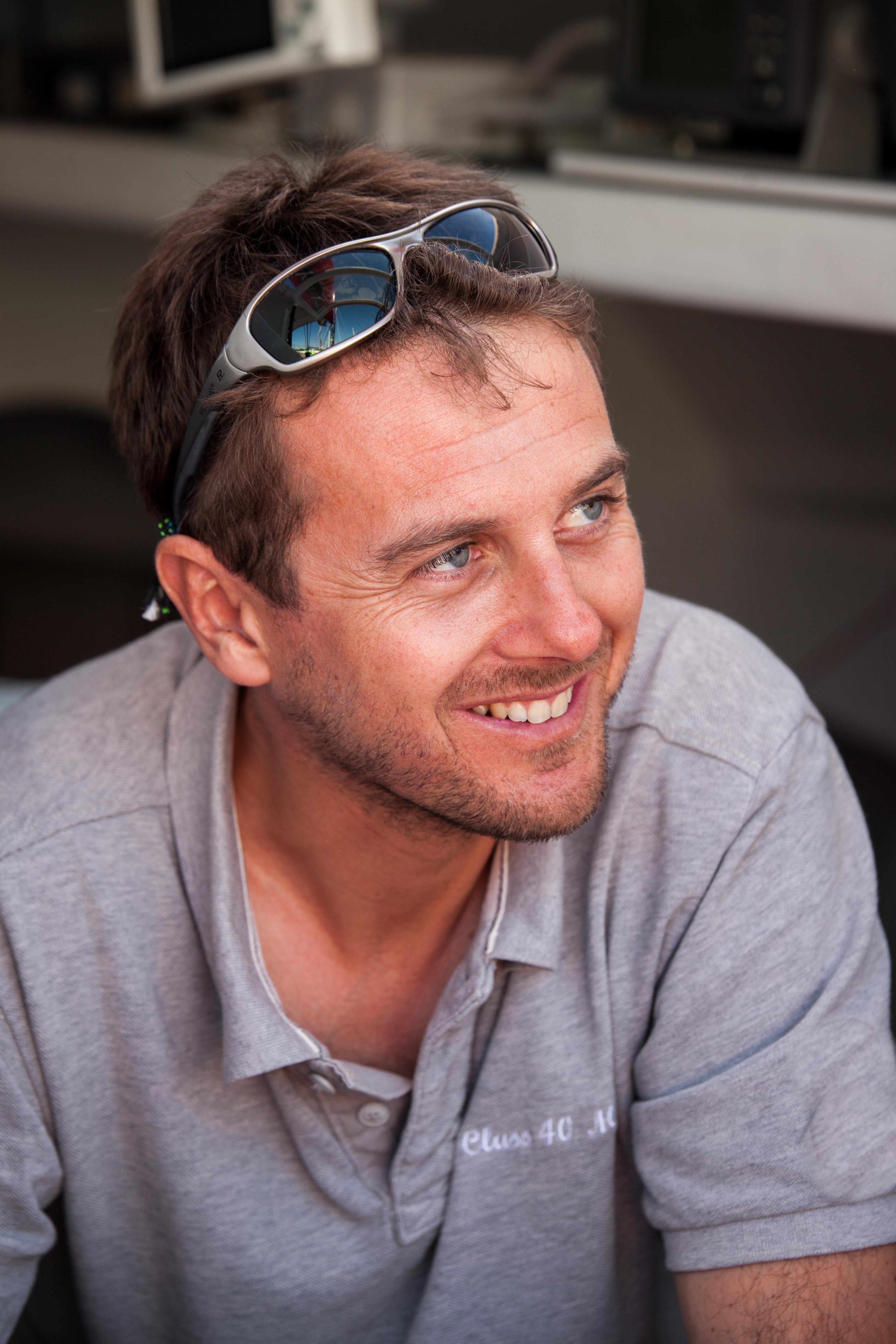 Stéphane Le Diraison - Skipper ingénieur